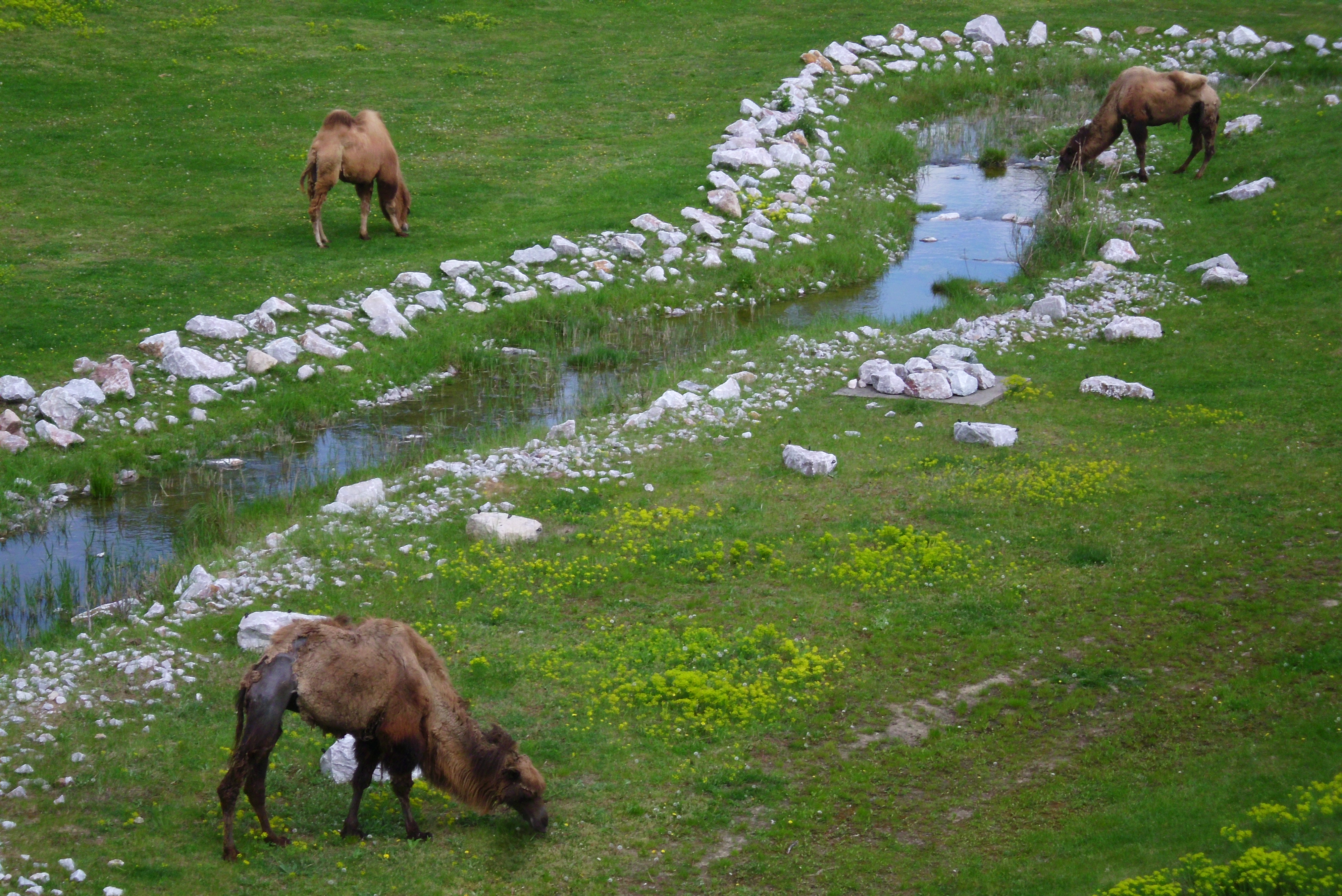 maj 2014 Poznań za pół ceny - Nowe Zoo